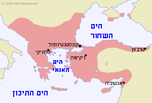 מפת האימפריה הביזנטית בשנת 1180 תורגם על ידי